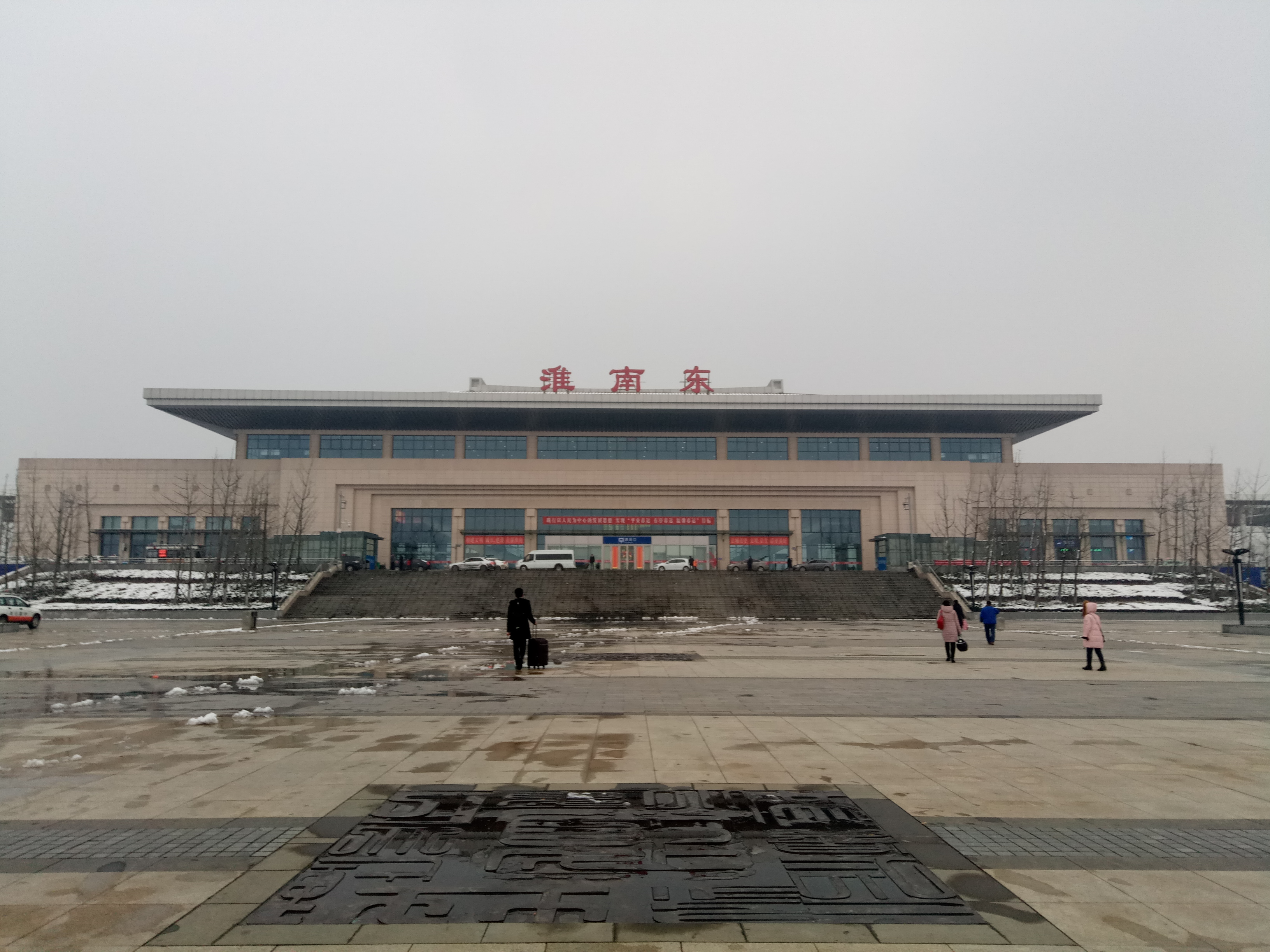 淮南东站站房